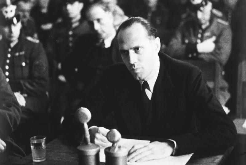 Volksgerichtshof, Helmuth James Graf v. Moltke Prozess 20. Juli 1944 [Helmuth James Graf von Moltke vor Mikrofonen, sitzend] Abgebildete Personen: Moltke, Helmuth-James von Graf: Prozeß 20. Juli 1944, 1945 Berlin-Plötzensee hingerichtet, Deutschland